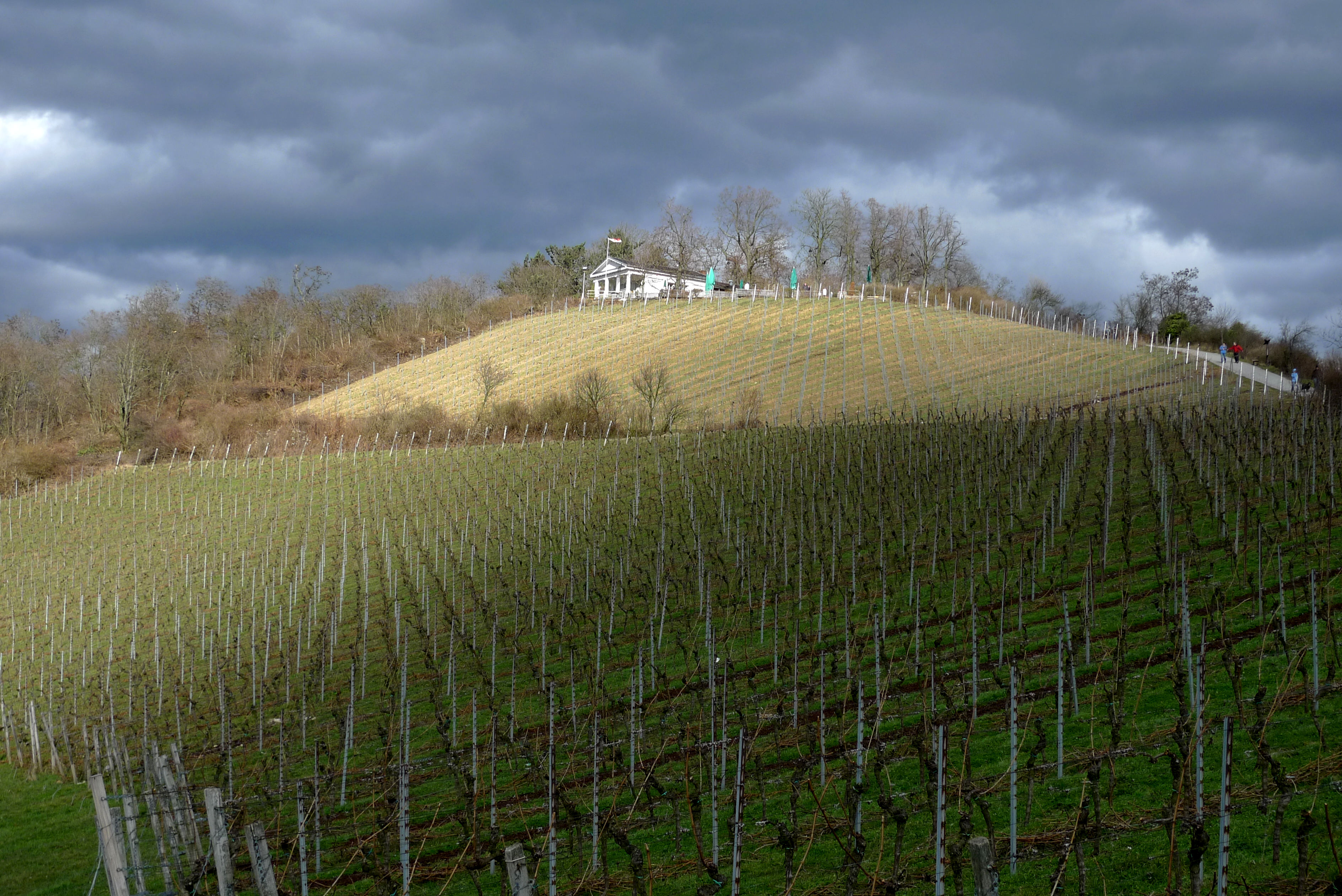 Kirchberg mit Kirchberghäuschen (Bensheim)